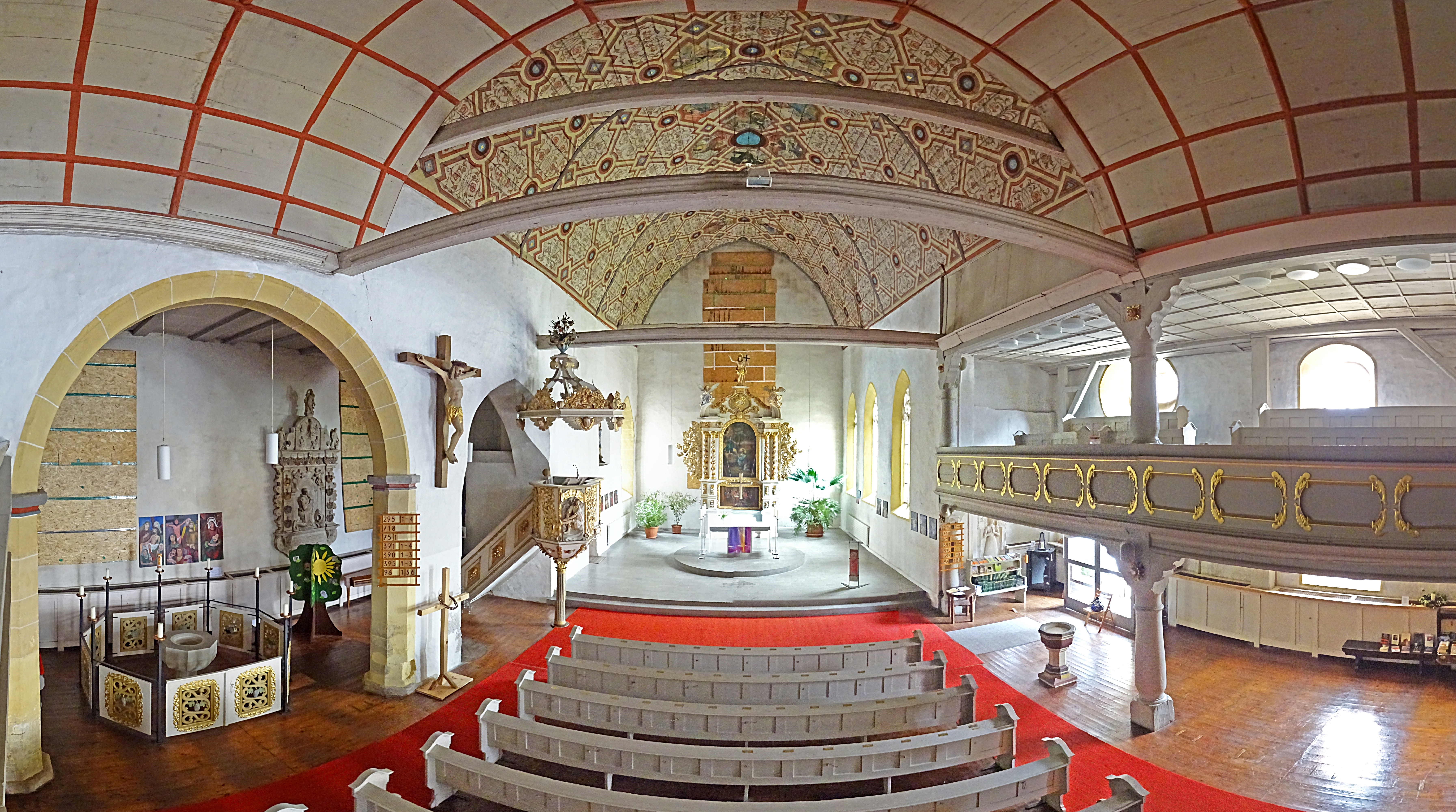 Innenraum Panorama St. Marien Bleicherode